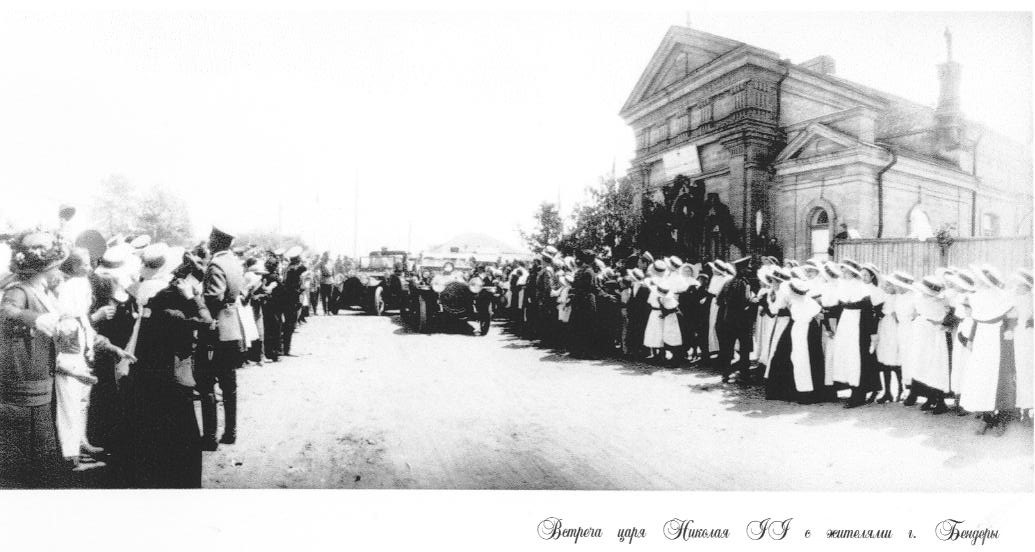 Визит императора Николая II в г. Бендеры. Здесь он посетил лазарет, размещавшийся тогда в городской Аудитории.